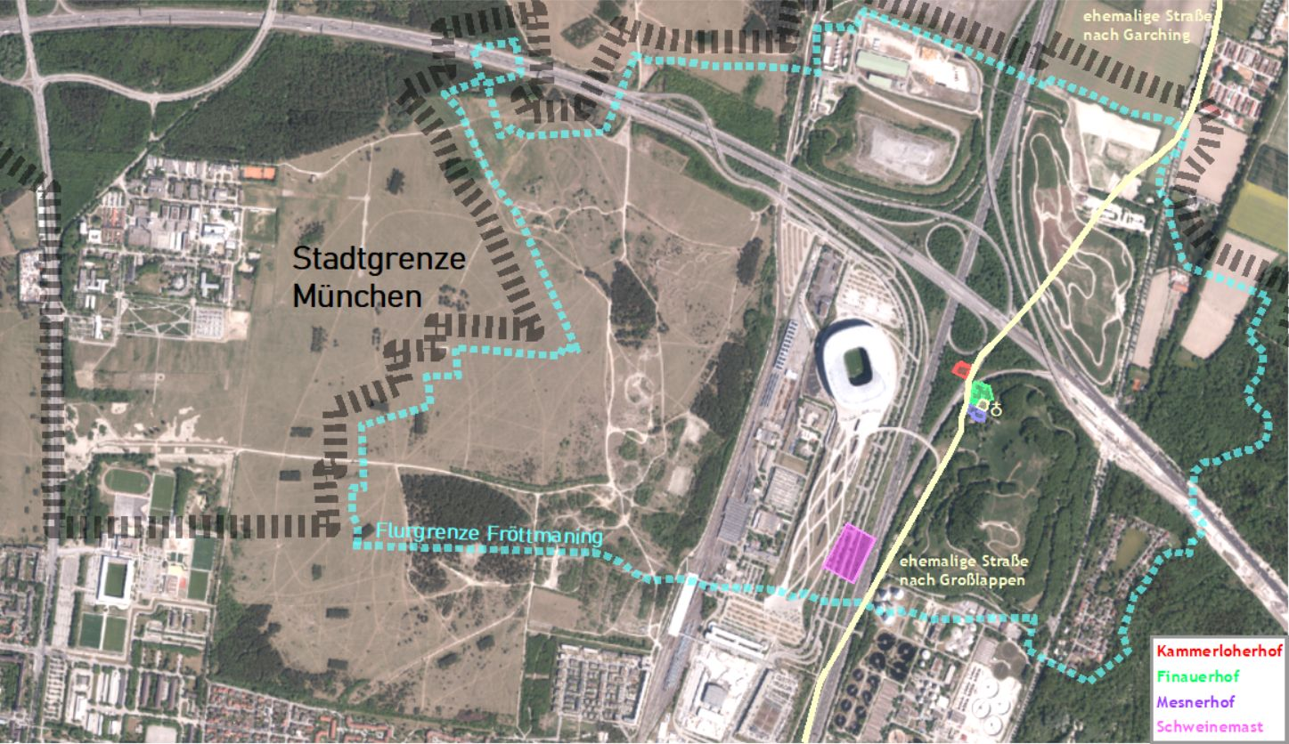 Fröttmaning mit Dorfkern um 1938 im Hintergrund zum Vergleich ein Luftbild von 2018, ungefähre Flurgrenze von Fröttmaning (1960, cyanfarben, gestrichelt), ungefähre Lage der Höfe (Aufzeichnungen von Emmerig 1938), Kammerloherhof (rot), Finauerhof (grün), Mesnerhof (lila), ungefährer ehemaliger Straßenverlauf und Lage einer Schweinemast in magenta (Karte von 1911), ungefähre Lage der Stadtgrenze von München (schwarz gestrichelt)